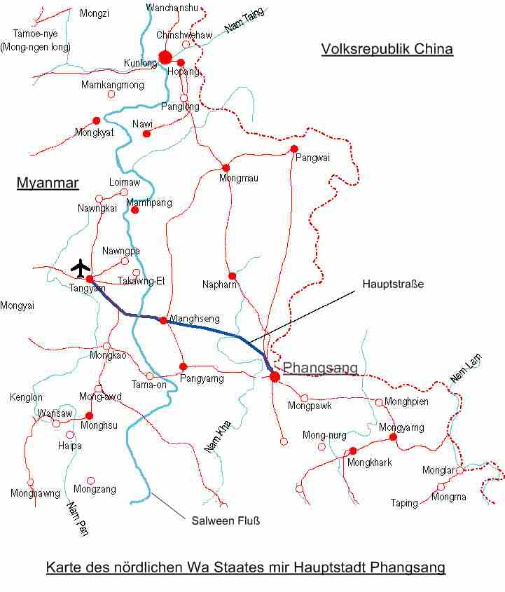 Karte des Wa Staat mit Hauptstadt Pangsang